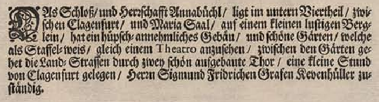 Digitalisierung: Seiten 13&14: Ansicht Arnoldsteins und Anabichls